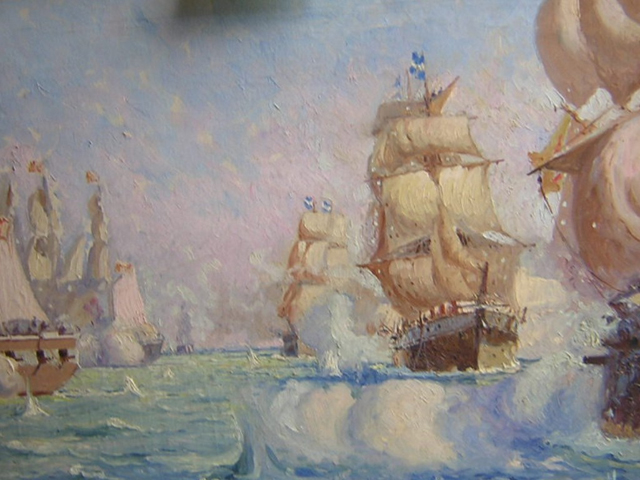 Combate naval del Buceo, óleo sobre tela.